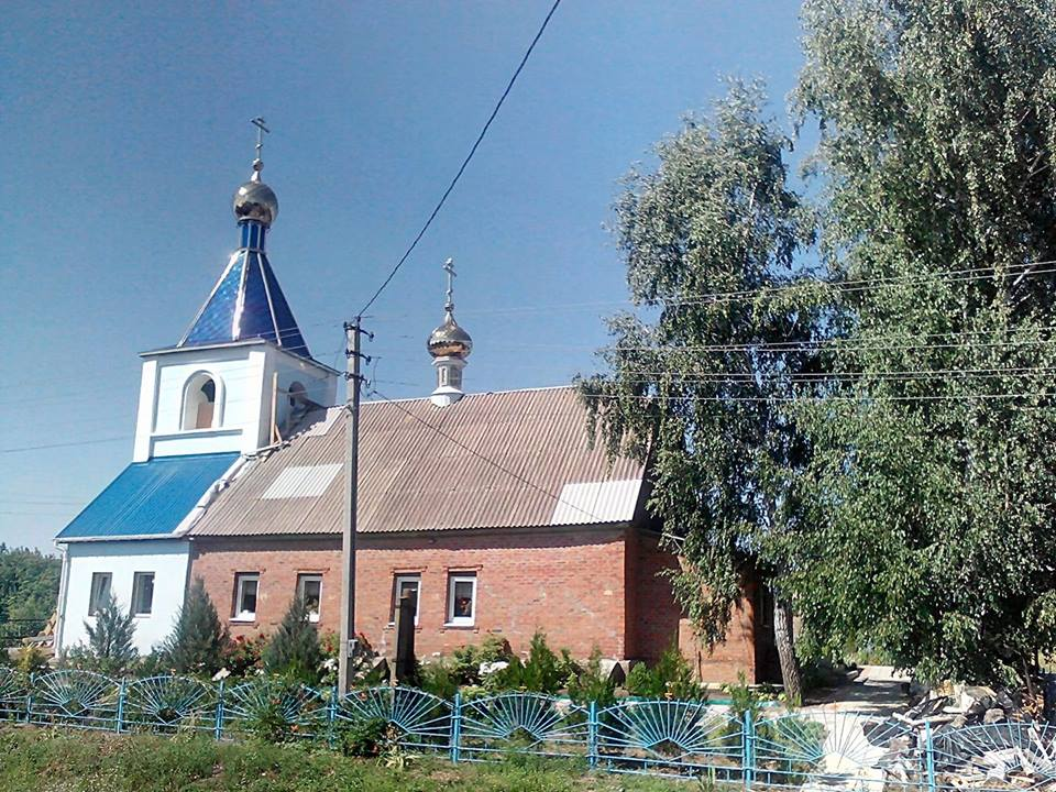 Україна. Харківська область, Зміївський район, с.Костянтівка. Храм Різдва Богородиці. 5.08.2017